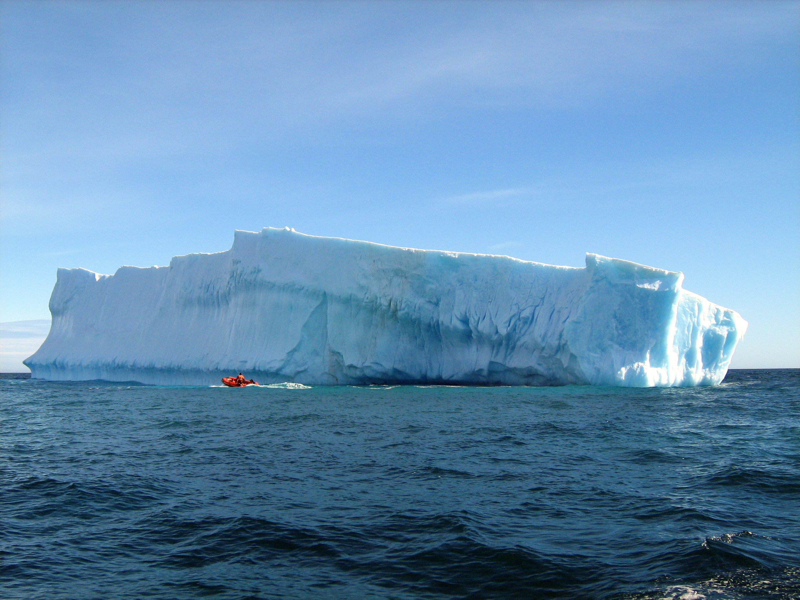 Iceberg in Branfield Strait